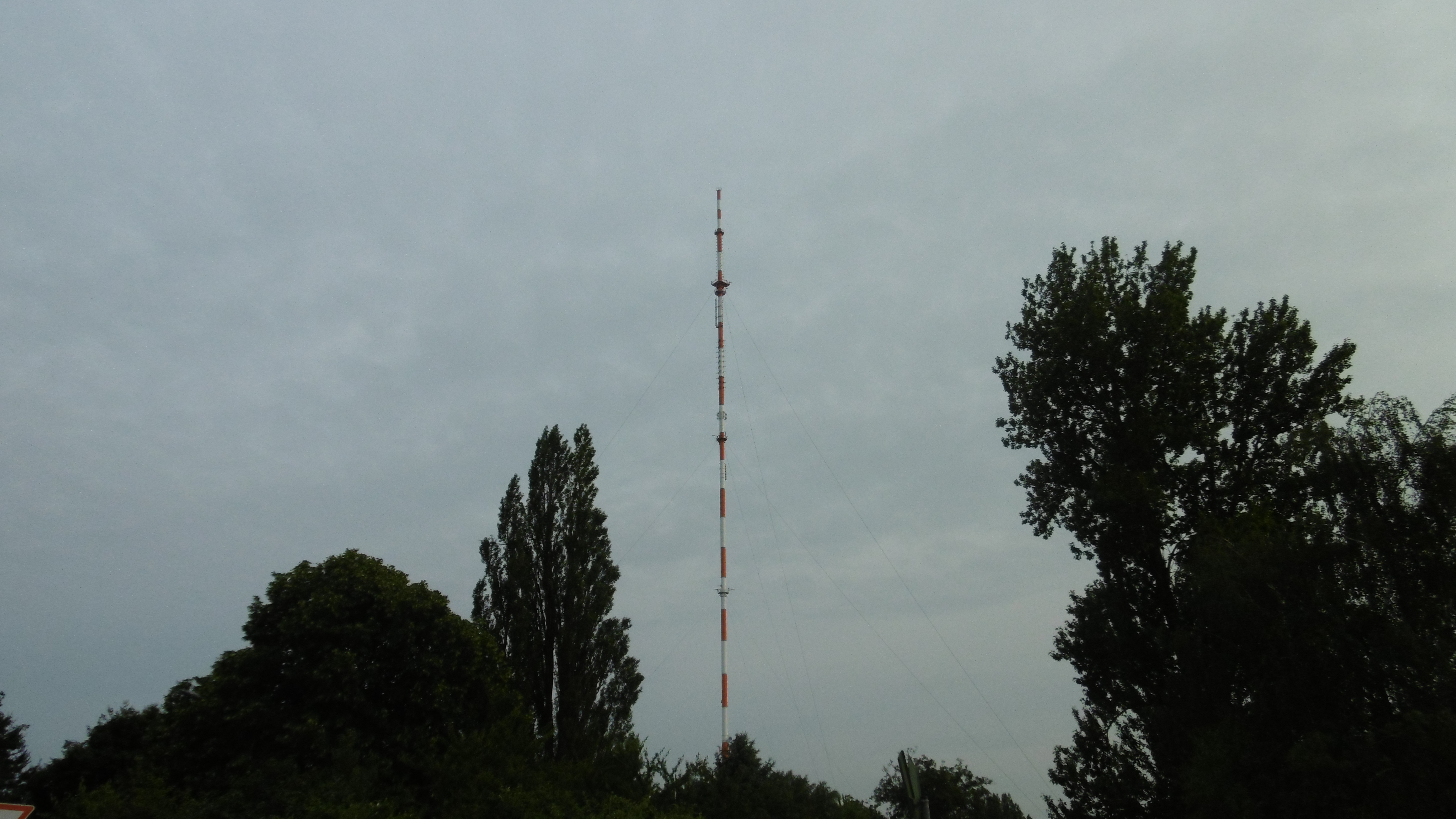 Dieses Foto zeigt die Sendeanlage des Norddeutschen Rundfunks in Hamburg Moorfleet